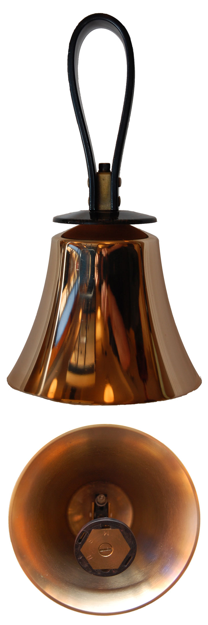 Handbell, side and bottom views